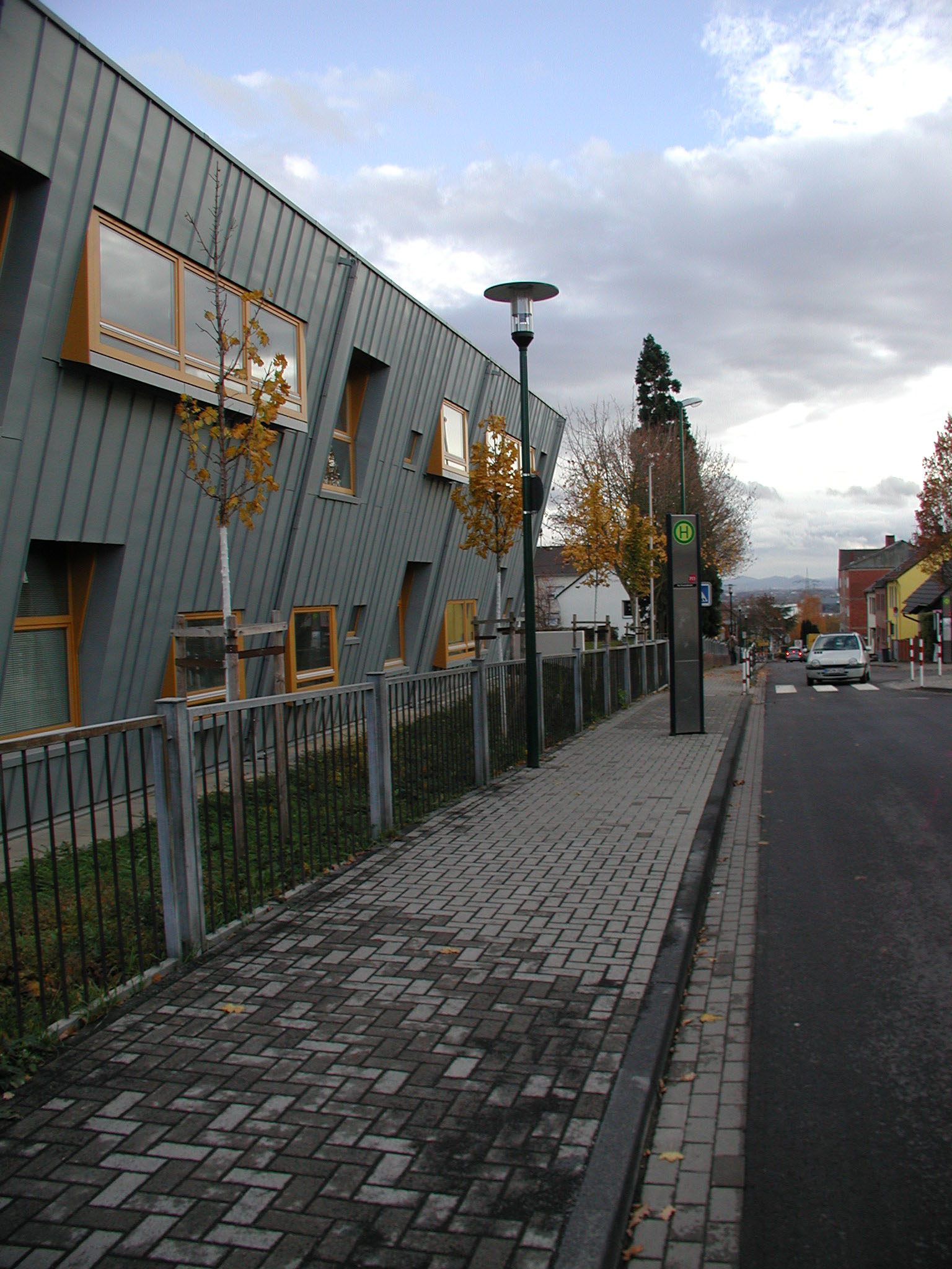 Hürth-Fischenich, Schulgebäude